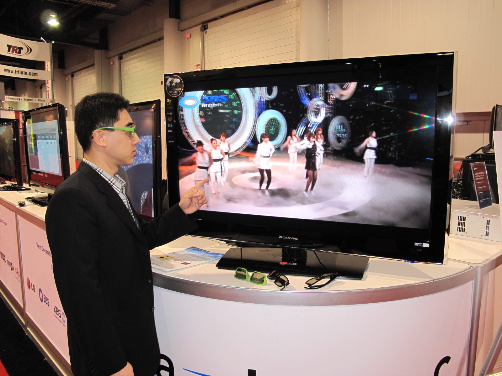 LG전자가 SBS와 공동으로 세계 최초로 지상파 방송망의 일부 대역을 활용한 3d tv 기술 개발과 시연에 성공했다. 사진은 12일(한국시간) 미국 라스베이거스에서 개막한 세계 최대의 방송장비 전시회인 Nab 2010에서 연구진이 서비스를 시연하는 장면.